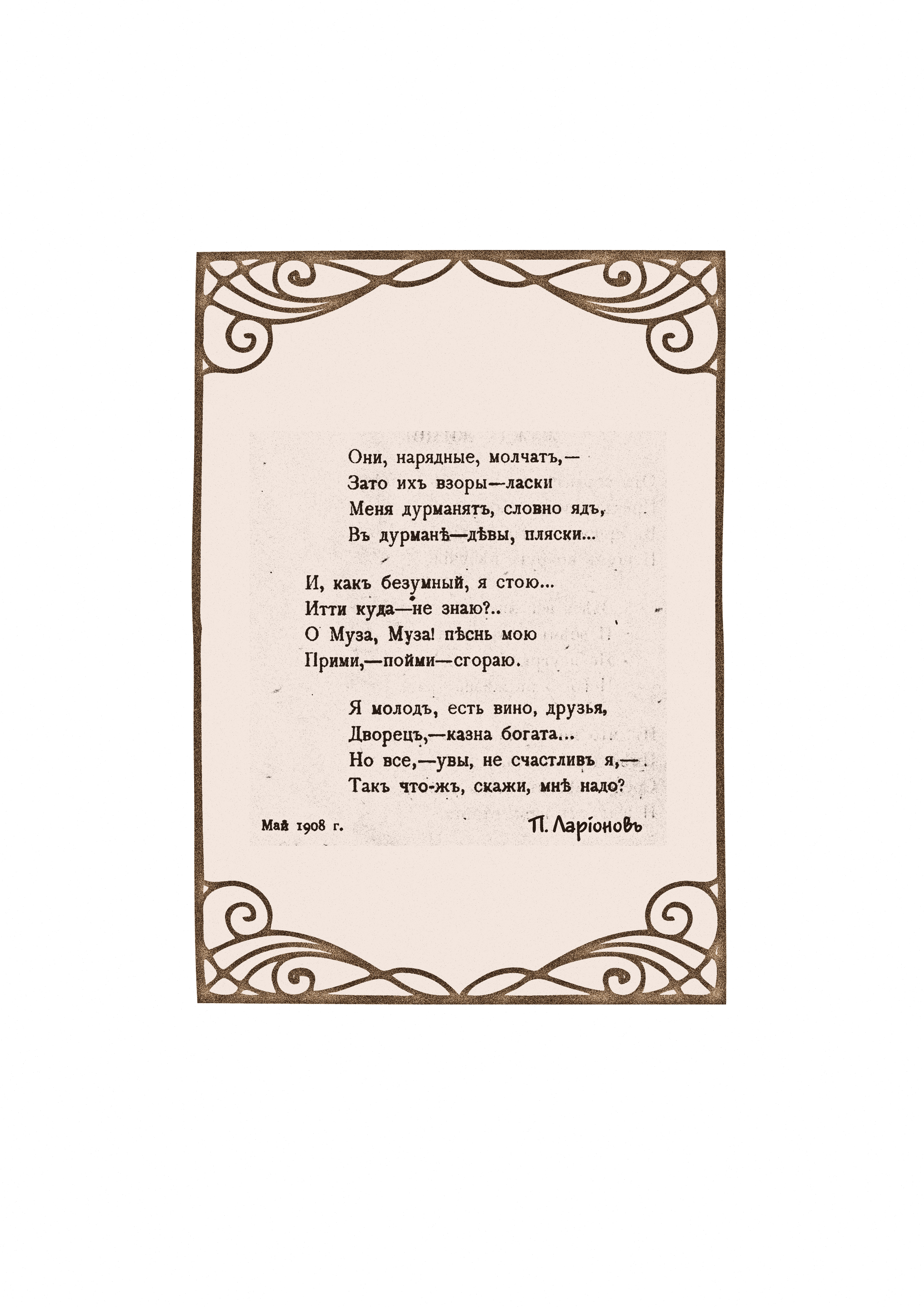 Петр Андреевич Ларионов «Они нарядные стоят»